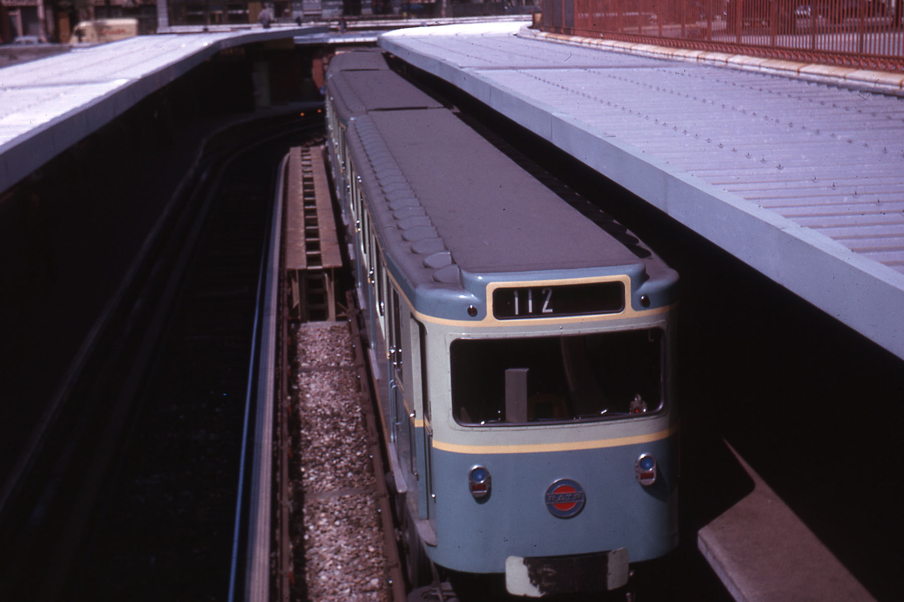 Rame sur pneus de la Ligne 1 à la station Bastille.